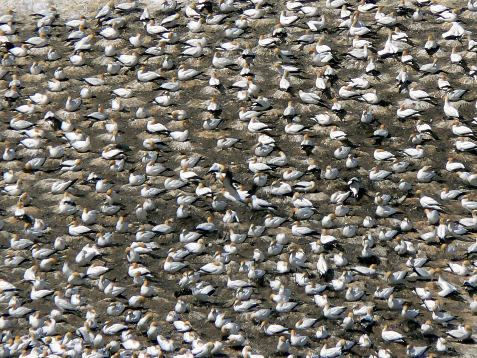 New Zealand, Napier